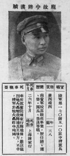 抗戰軍人忠烈錄第一輯中的烈士遺像